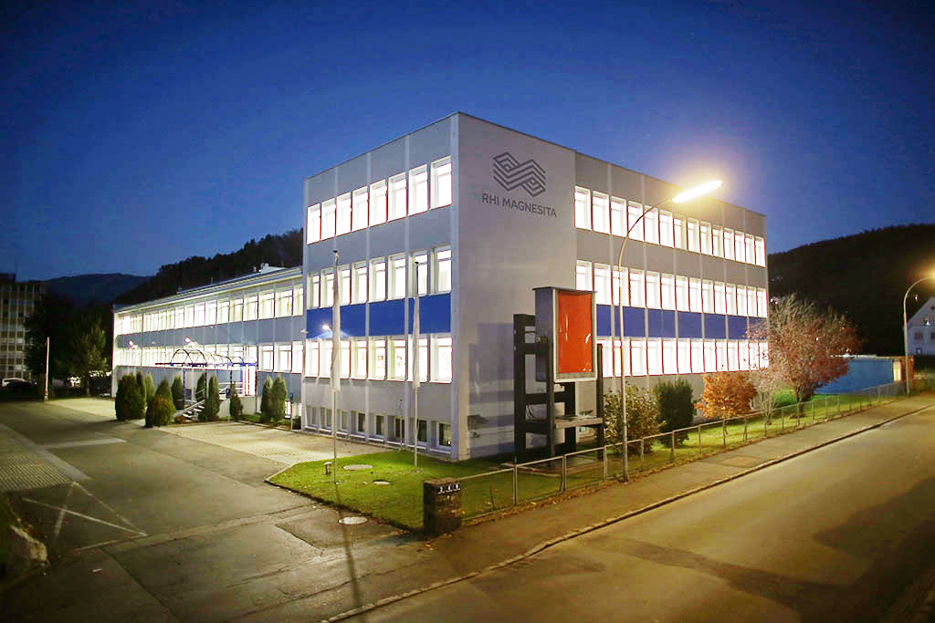 RHI Magnesita Technology Center, Leoben